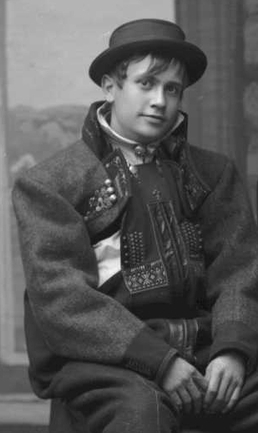 Halfdan Egedius, utsnitt fra bilde med Egedius og Lars Jorde. Foto: L. Szacinski (1895). Fra Byhistorisk samling hos Oslo Museum.